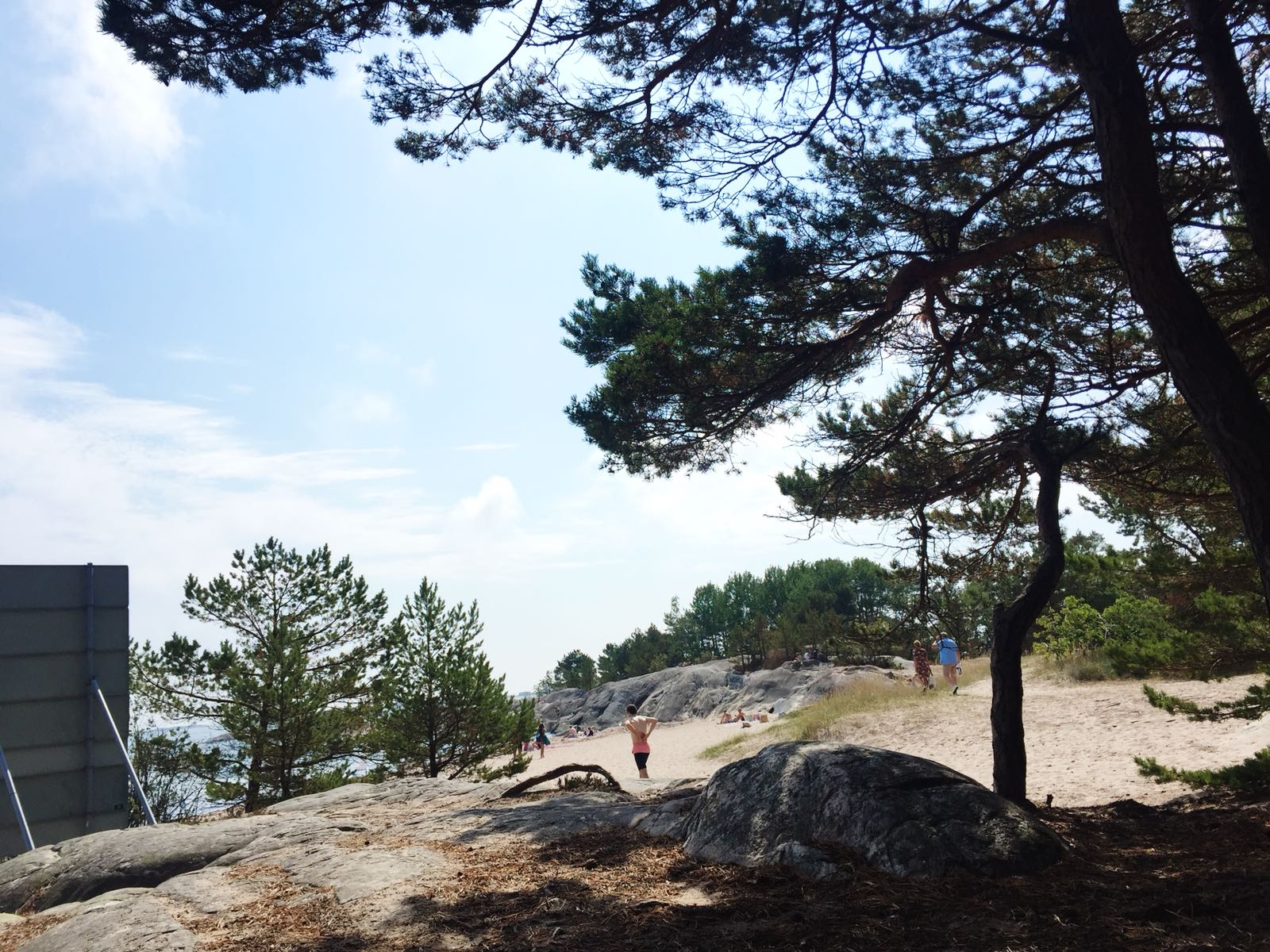 Strand auf Sandmann